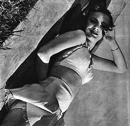 Martha Holliday